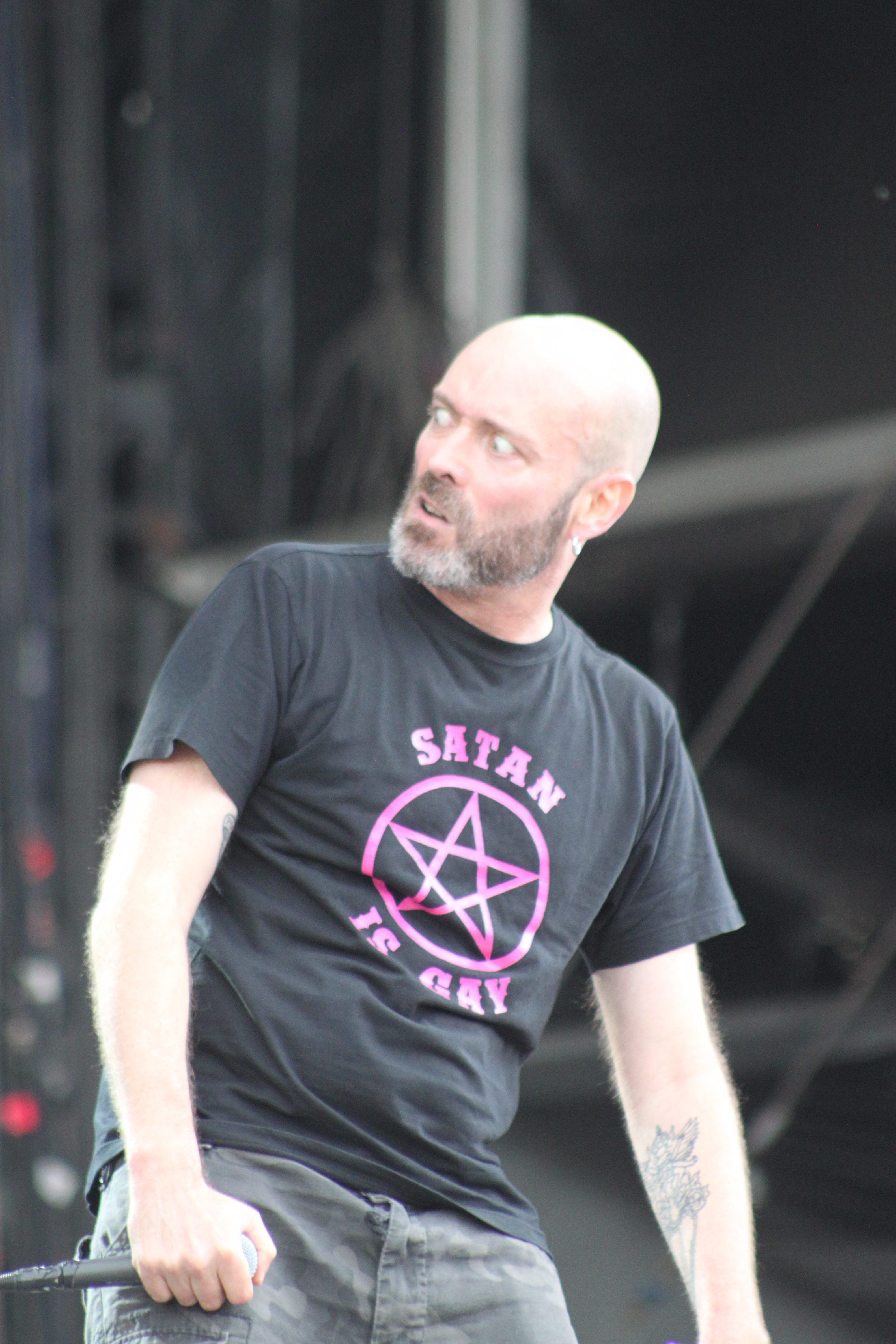 Hellfest 2014. Reuno, Lofofora. Fr-44-Clisson.